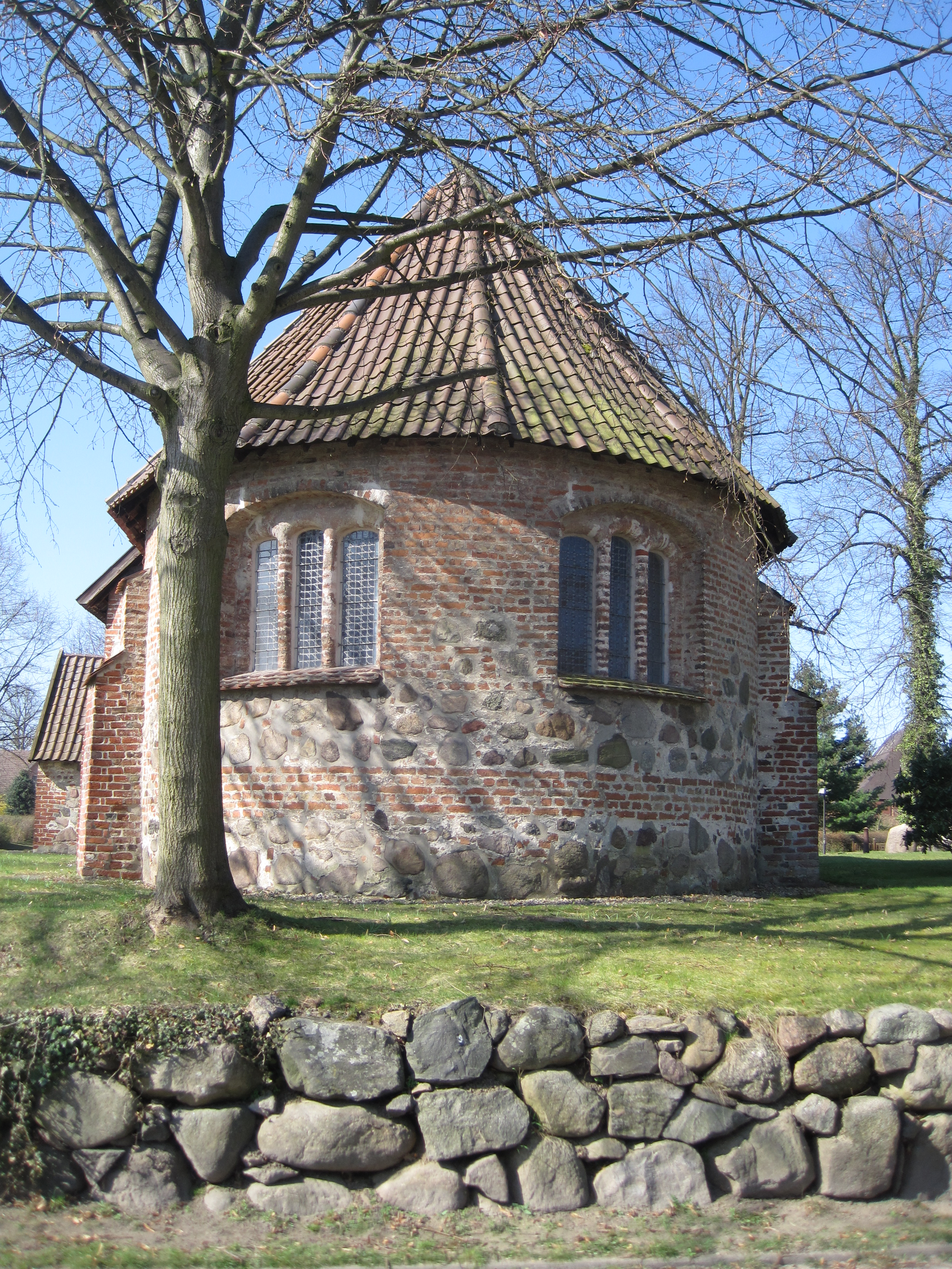 Rundchor der Kirche in Ziethen (Lauenburg)